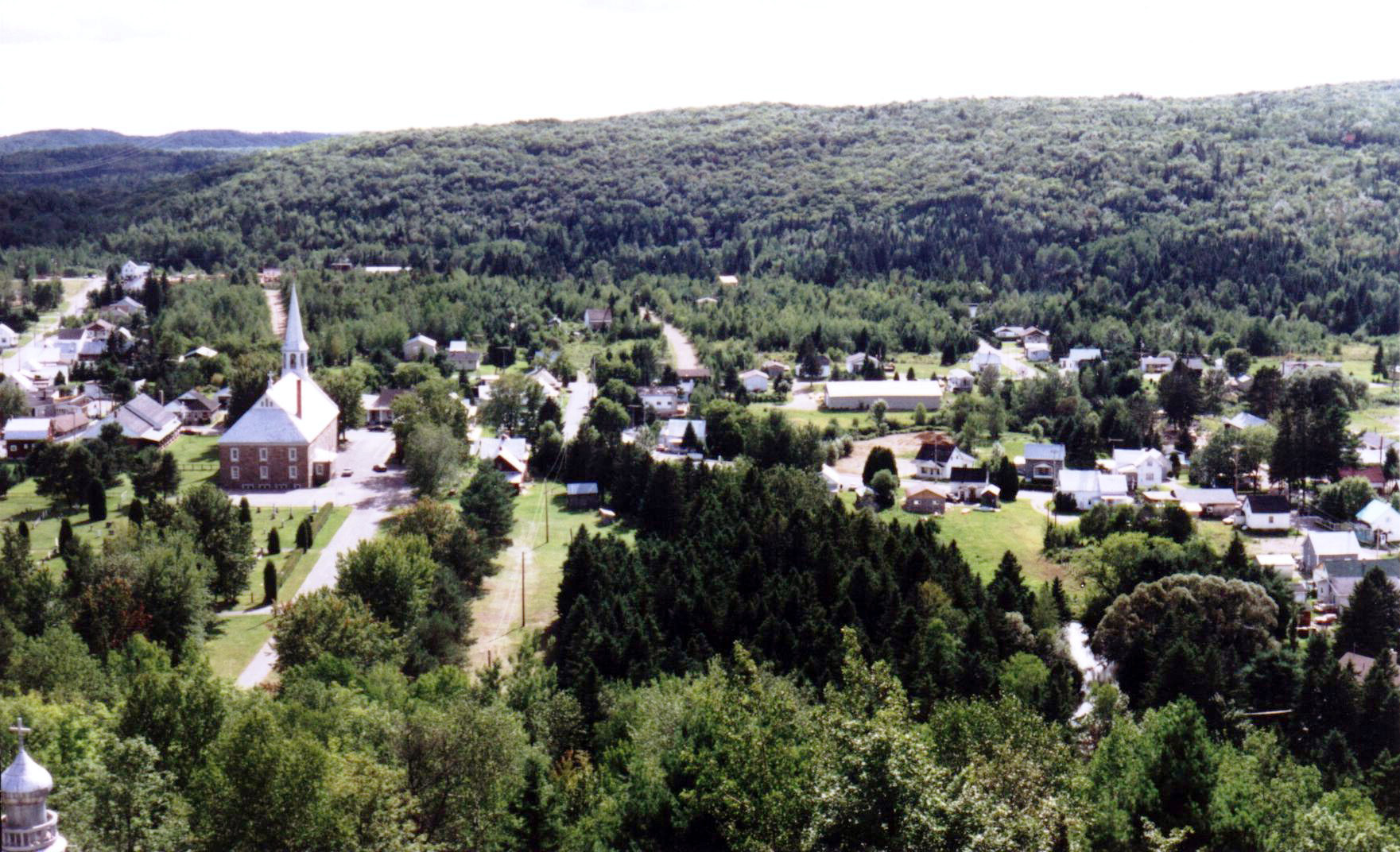 Village de Saint-Élie-de-Caxton du haut de la montagne du Calvaire.